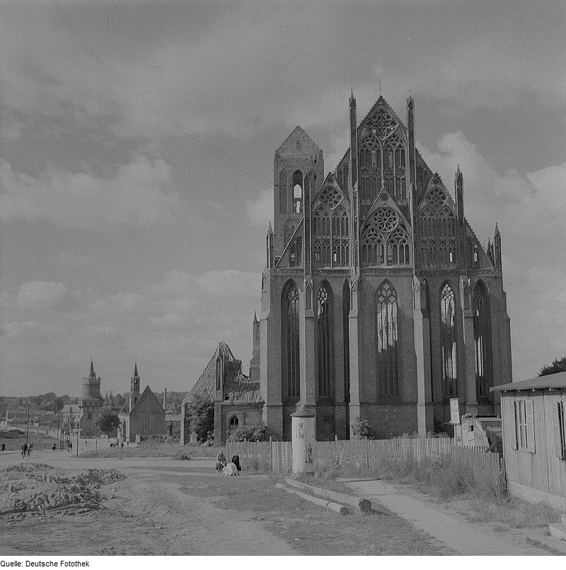 Original image description from the Deutsche Fotothek Prenzlau. Marienkirche, Chorfassade mit Schmuckgiebel an der Ostseite